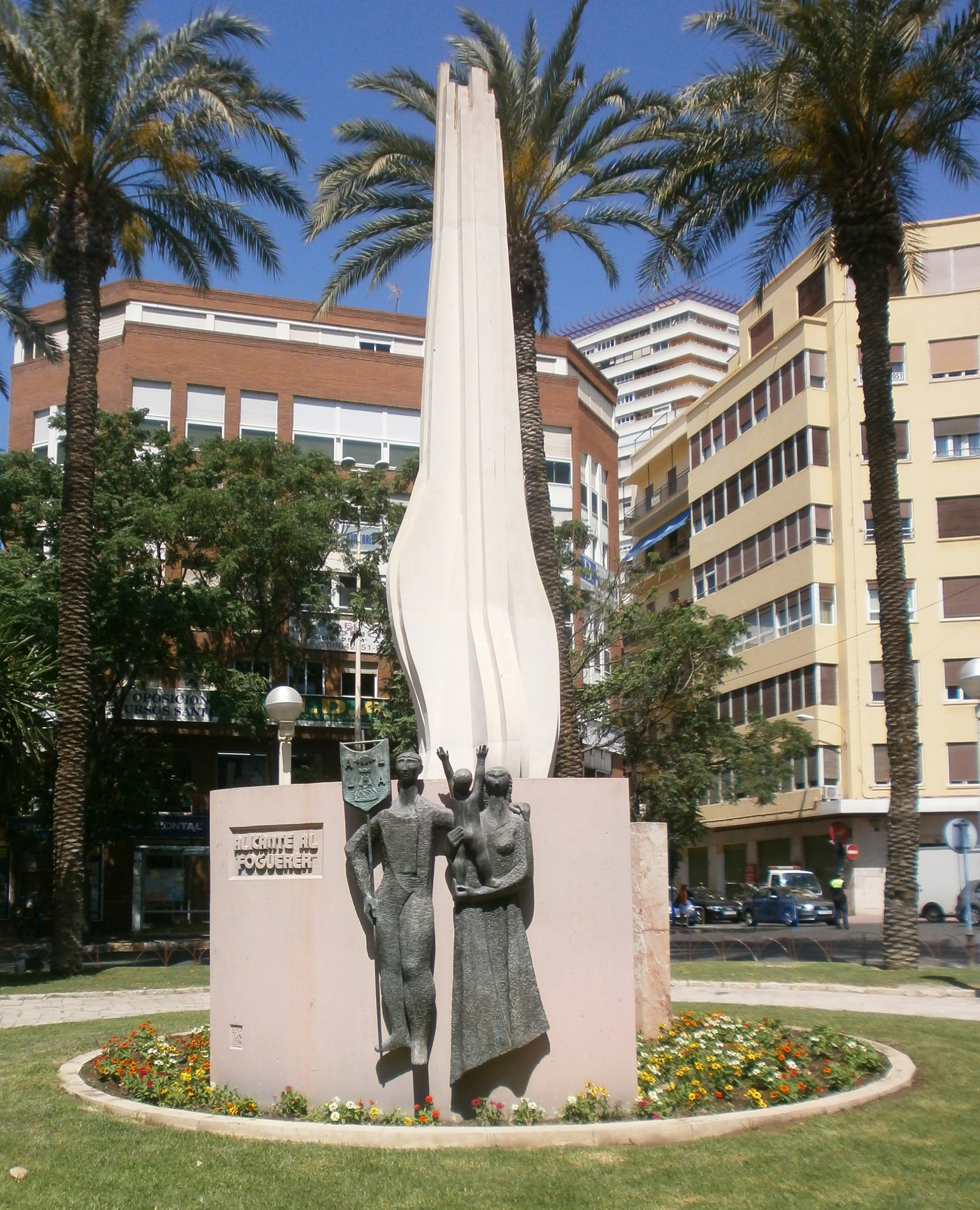 Monumento al foguerer, Alicante, España.